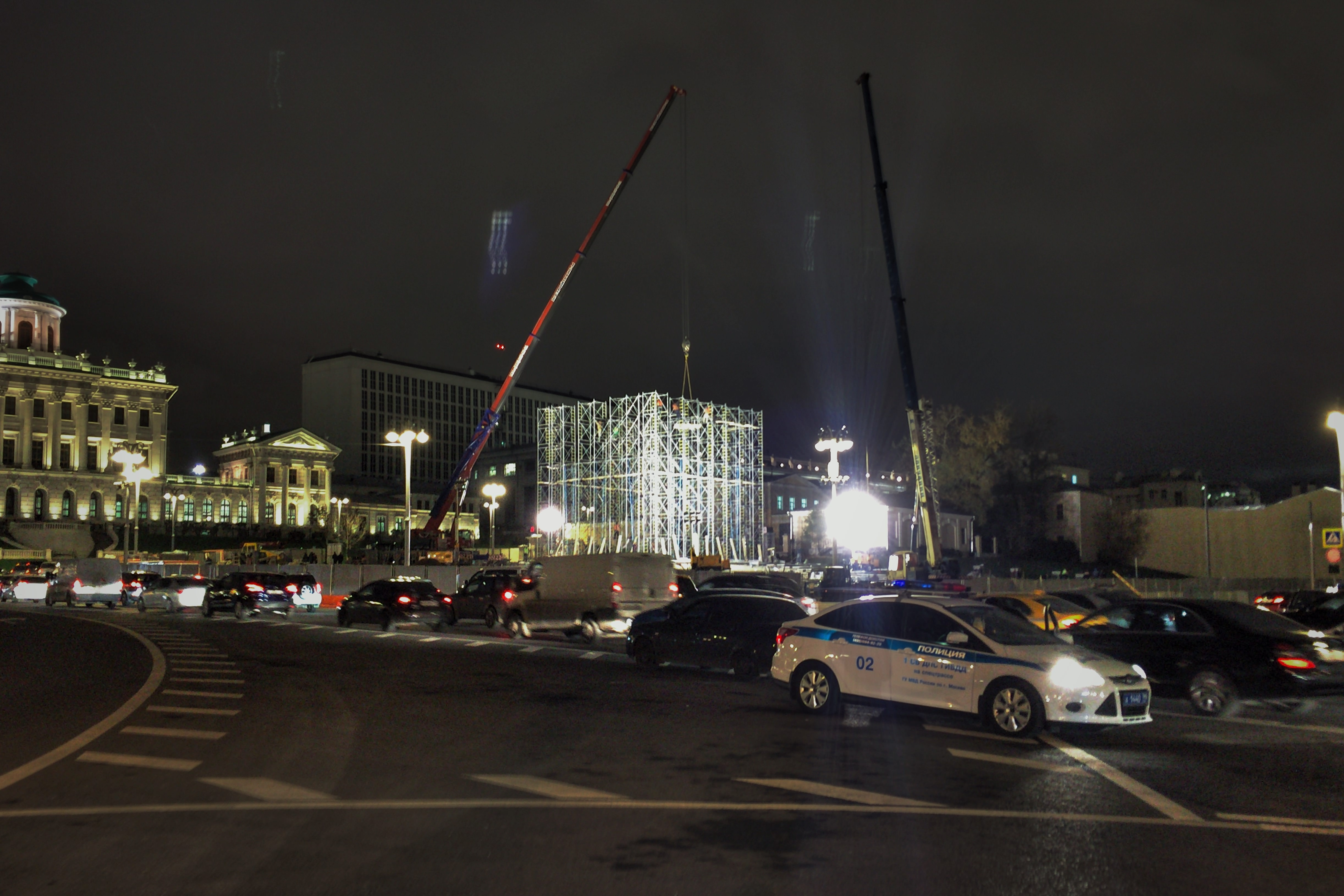 Боровицкая площадь. Строительство памятника св. Владимира